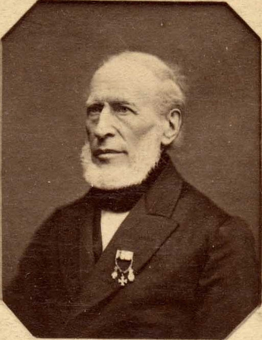 Marx Johann Friedrich Lucht, Direktor. Ausschnitt aus: Lehrercollegium des Christianeums zu Altona im Jahre 1880